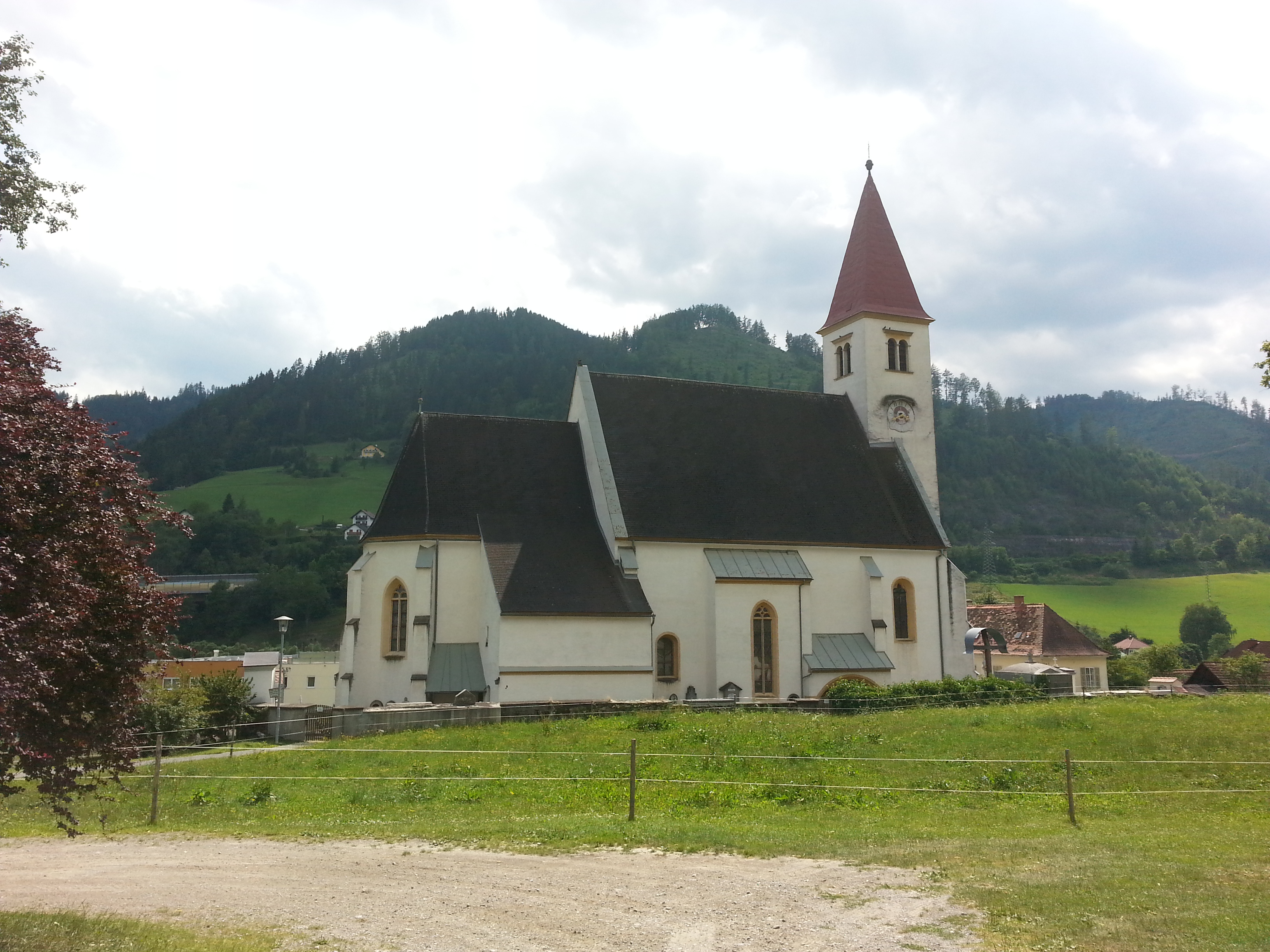 Die Pfarrkirche hl. Laurentius in Übelbach, Steiermark, Österreich